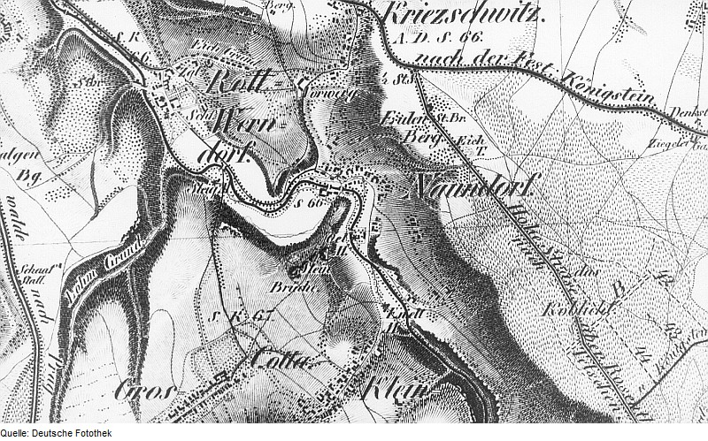 Original image description from the Deutsche Fotothek Struppen-Naundorf. Oberreit, Sect. Dresden, 1821/22